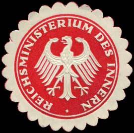 Sealing stamp Title: Reichsministerium des Innern Description: rot, weiß, geprägt Place: Berlin size: 4 cm